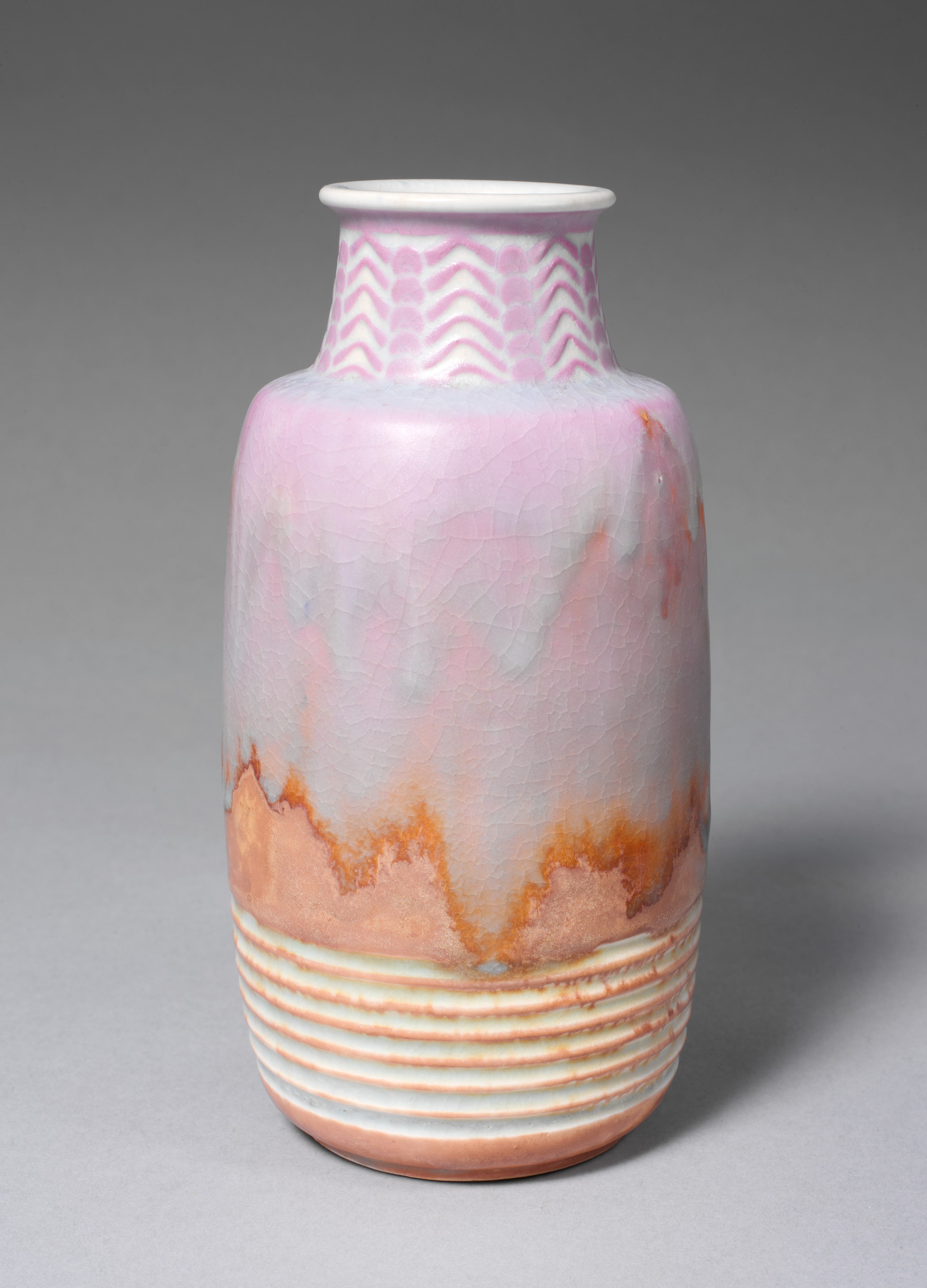 Vase; Ceramics-Porcelain